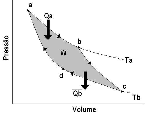 Gráfico que ilustra Pressao X Volume,Gustinho Rossi.